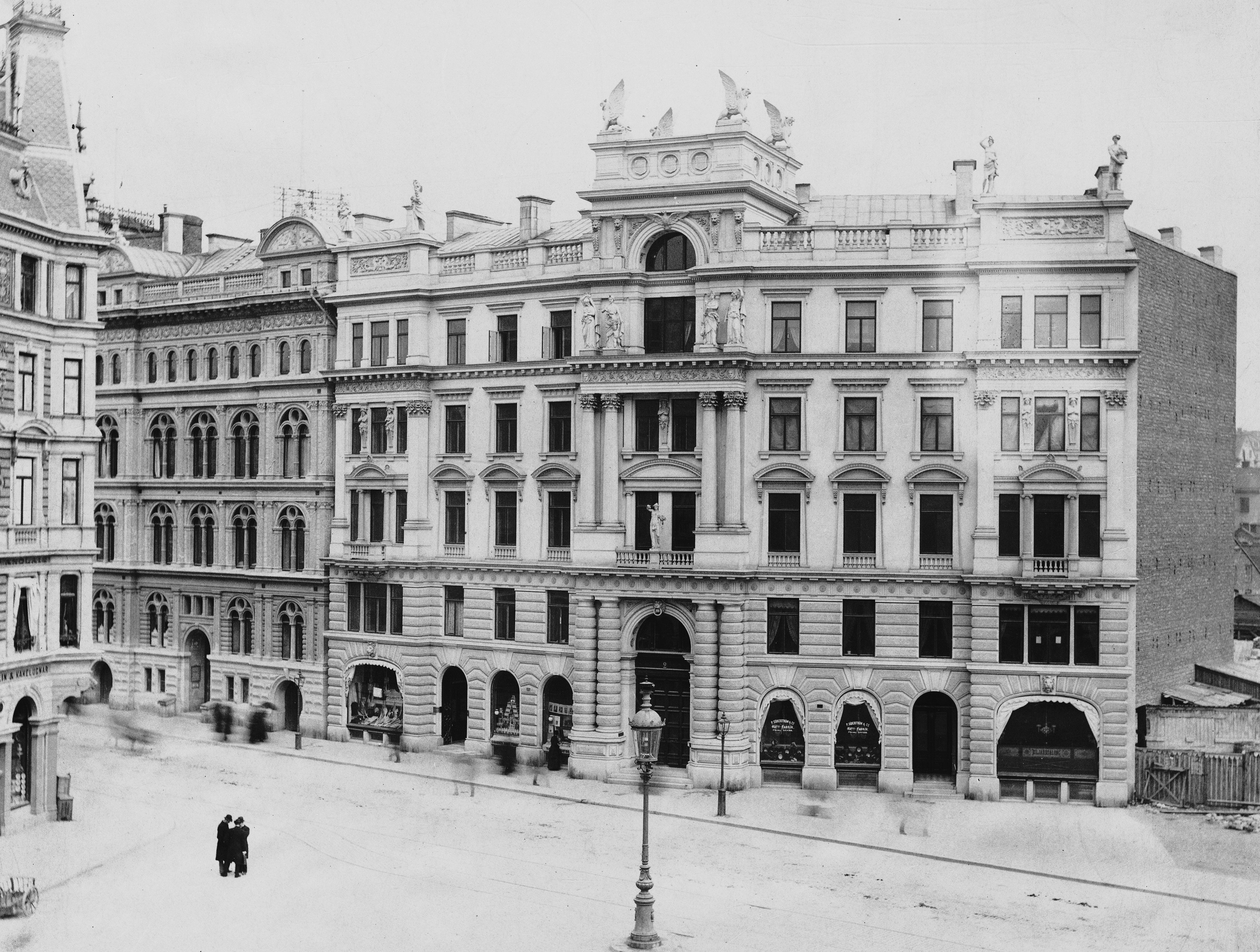 Bångska palatset vid Stureplan med Sturebadets hus längst till vänster